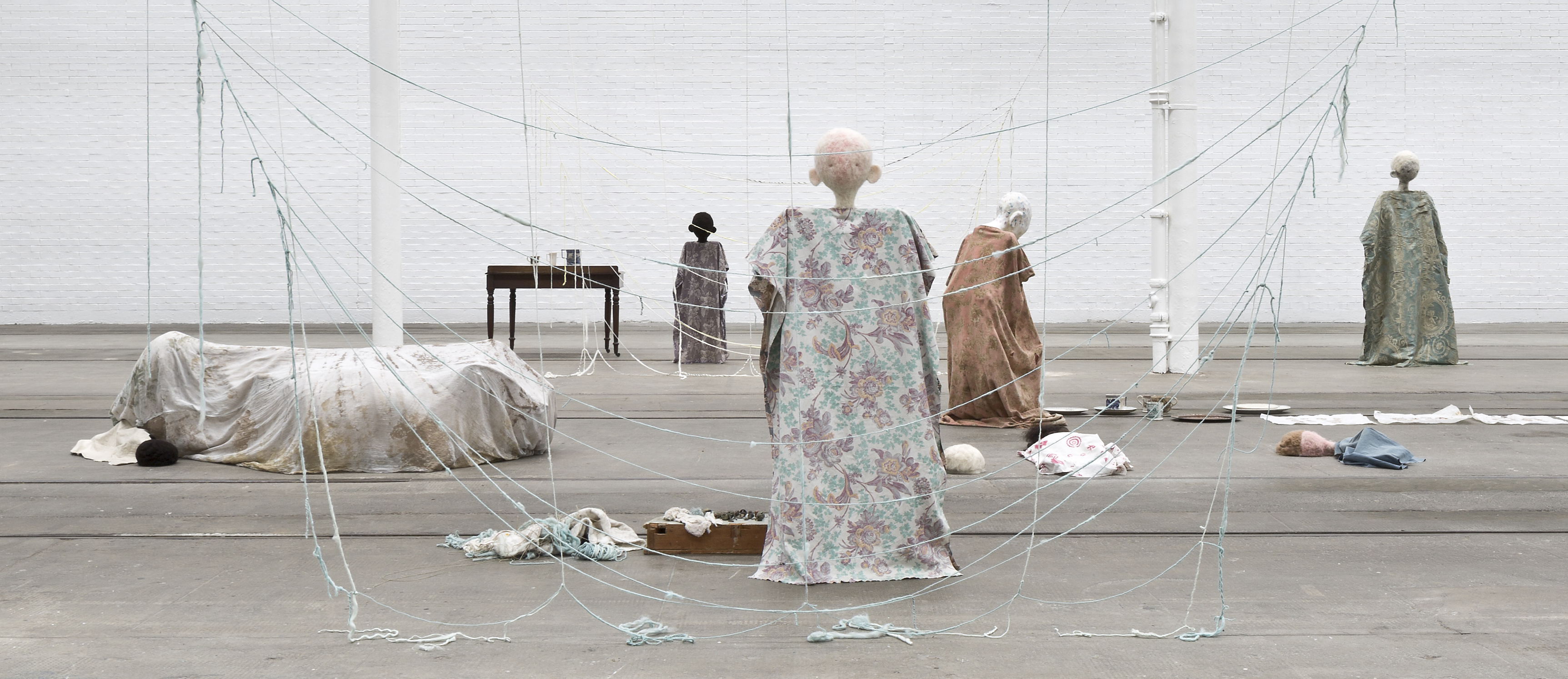 Instalacja Bez tytułu (2014) autorstwa Cathy Wilkes jest przykładem pracy, w której artystka łączy wątki osobiste z refleksją nad społeczno-politycznymi problemami współczesnego świata. Bezpośrednią inspiracją było zdjęcie odnalezione przez w gazecie, przedstawiające głodująca rodzinę afrykańską w podróży. Pragnąc odtworzyć tę scenę wydomowienia, artystka stworzyła wieloelementowe tableux składające się ze znalezionych przedmiotów - naczyń, nakryć stołowych i drobnych bibelotów oraz własnoręcznie wykonanych manekinów z włóczki i starych tkanin. Wilkes przedstawia postaci w scenie wanitatywnej, leżące bezładnie na ziemi lub stojące w żałobie z pochylonymi głowami. Wszystkie elementy tworzą nierozłączną, misternie zaplanowaną sytuację przestrzenną, potęgując tym samym moc oddziaływania instalacji na widza.